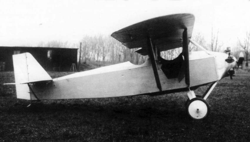 Litewski samolot szkolny ANBO-II.